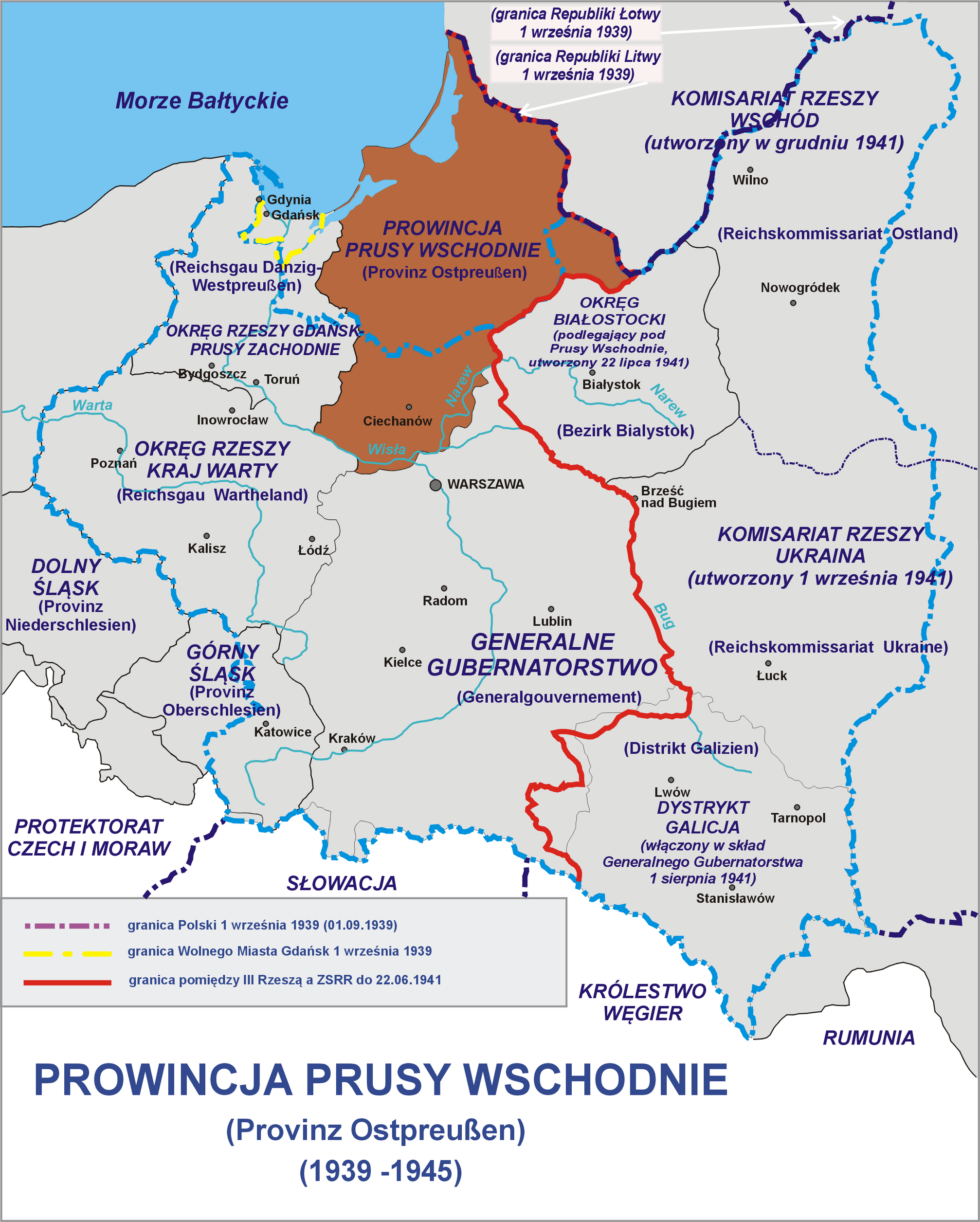 Prowincja Prusy Wschodnie (Provinz Ostpreussen) 1939-1945